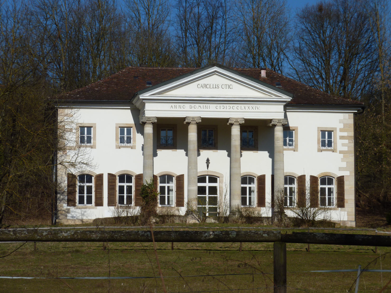 Schloss in Scharnhausen